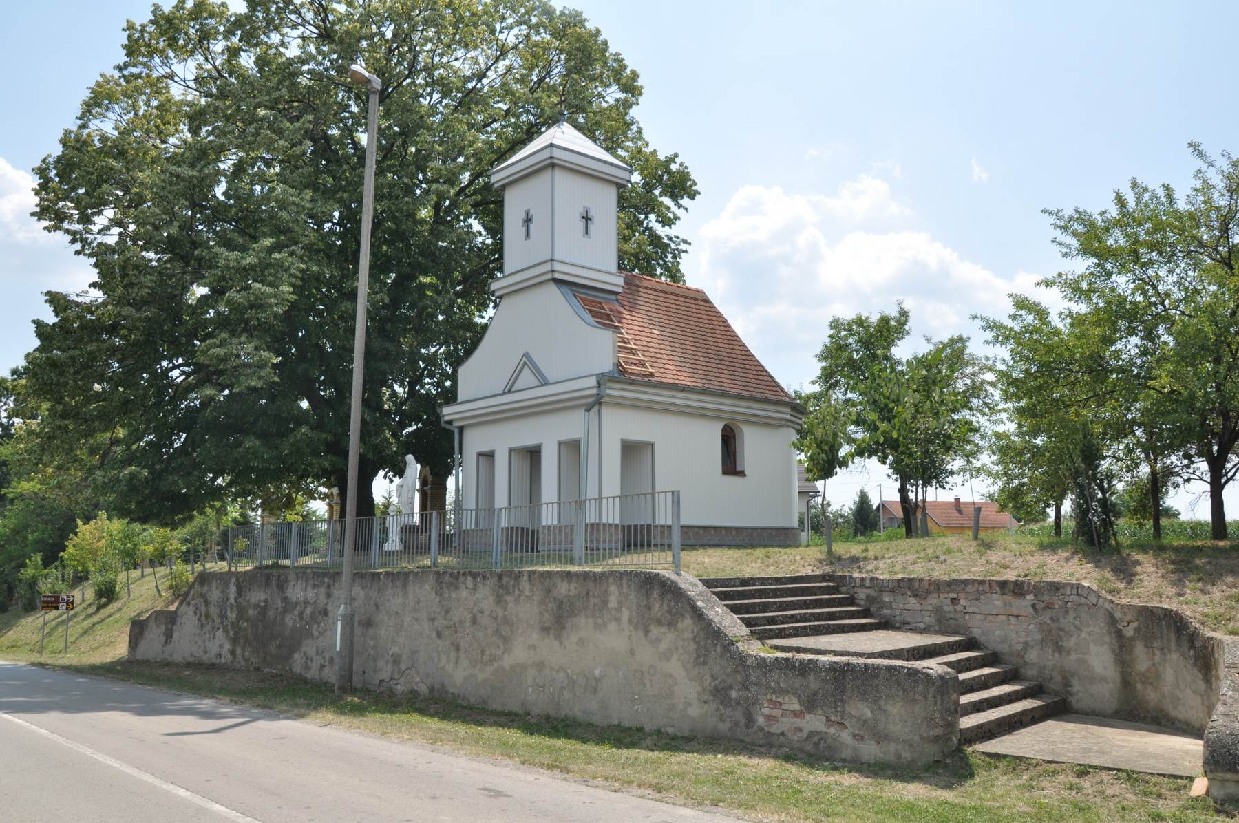 Kalvarija Gradište